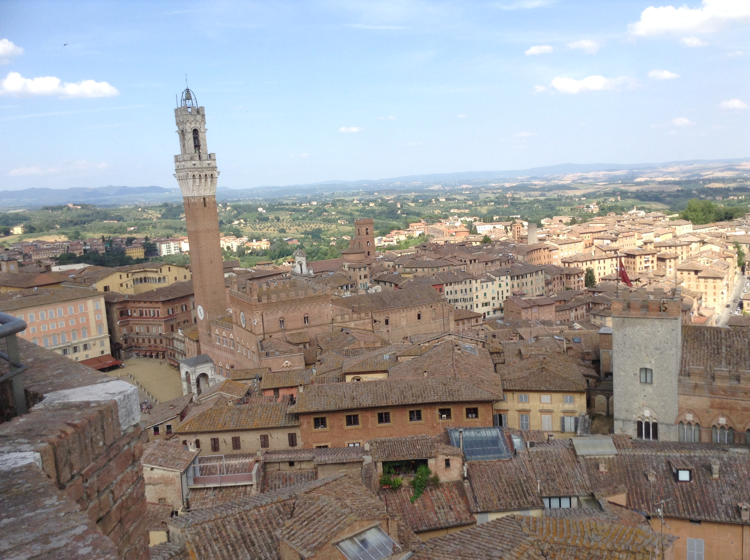 Siena vista dall'alto